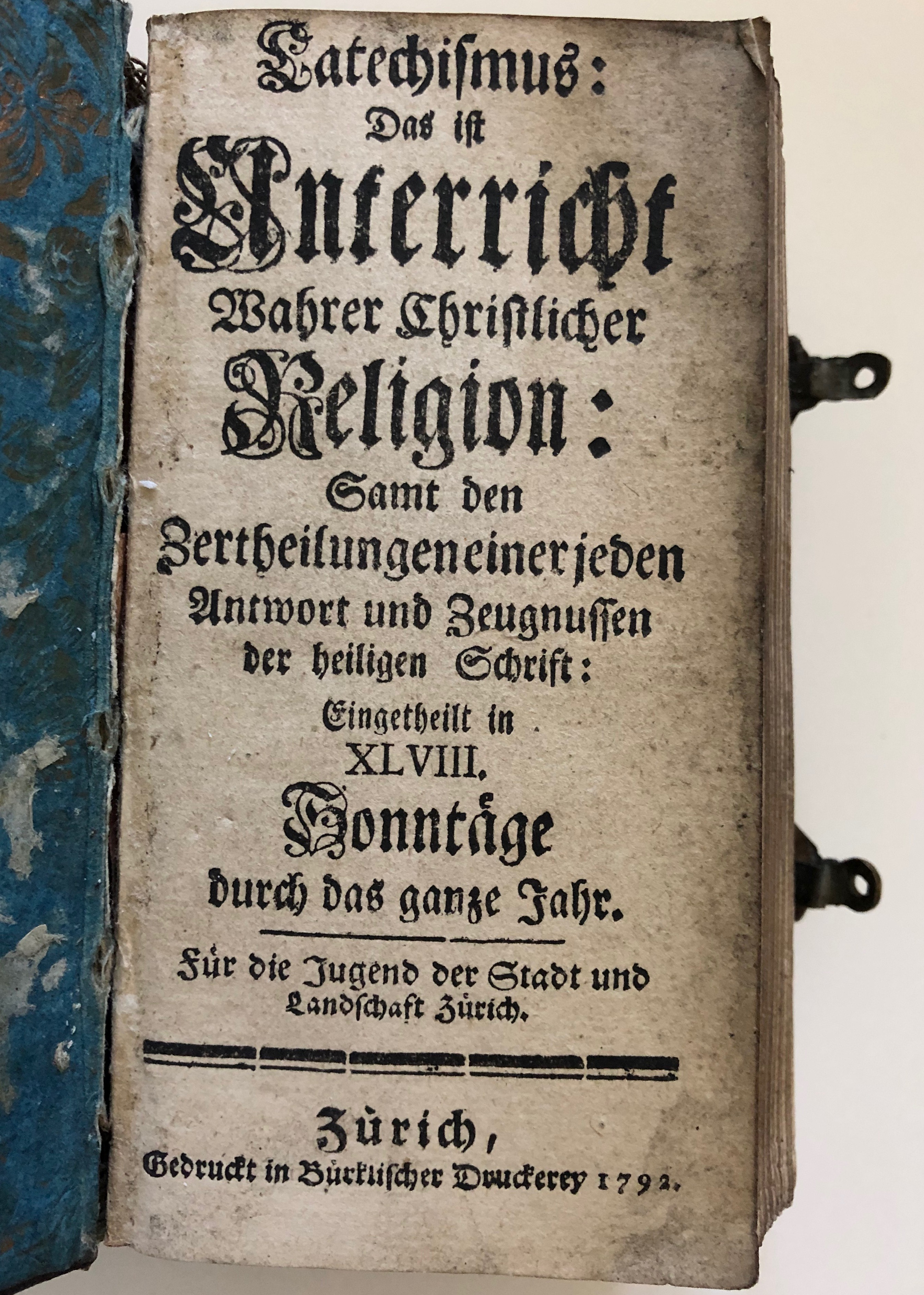 Katechismus, 1792, Druckerei Bürkli, Zürich